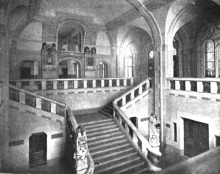 Fernsprechamt Schlüterstraße, Haupteingangshalle, von der Schlüterstraße aus zu betreten